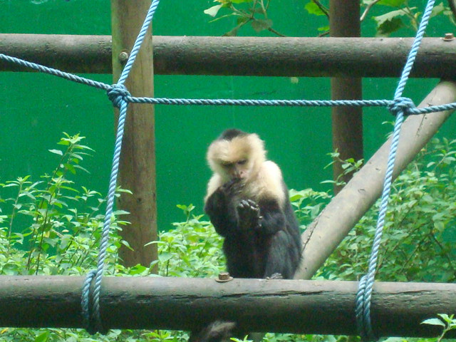 Mono carablanca (Cebus capucinus) en el Zoológico Simón Bolívar. Costa Rica.